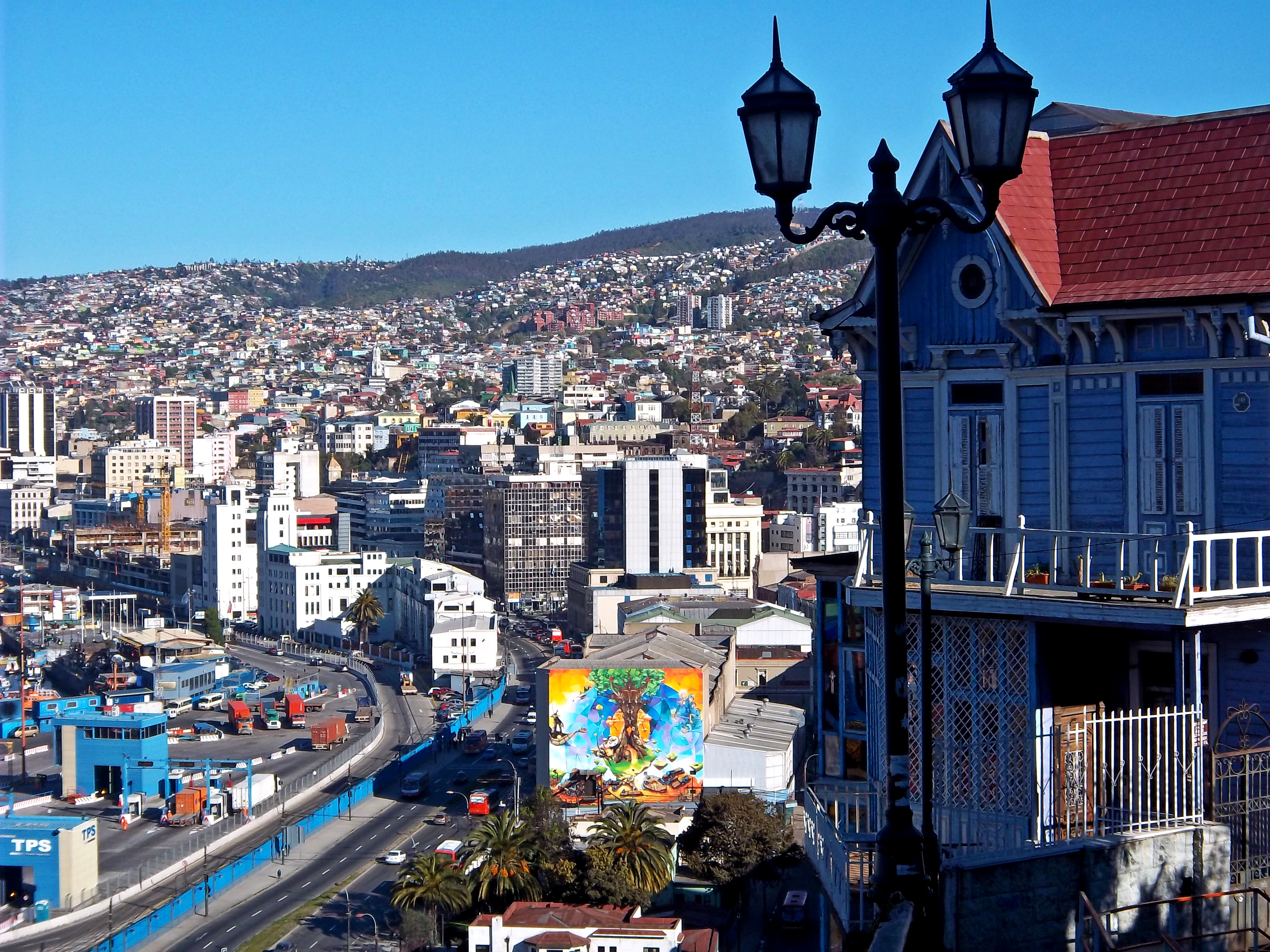 casona del cerro artillería